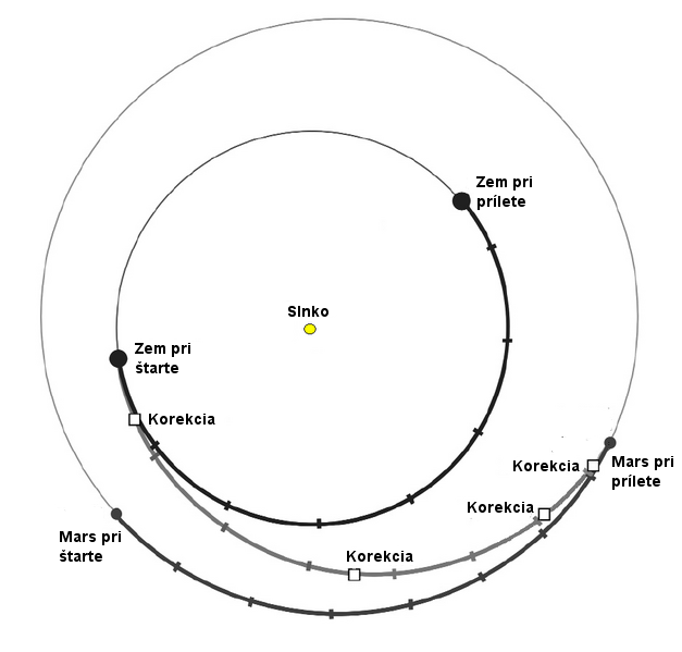 Dráha sondy - zarážky na dráhe sú po mesiacoch. Medziplanetárna dráha sondy Mars Reconnaissance Orbiter. Modifikované z tlačovej správy NASA Zdroj: NASA Dátum: 26.1.2006 Autor: Adrian Povolenie: PD Iné verzie tohto súboru